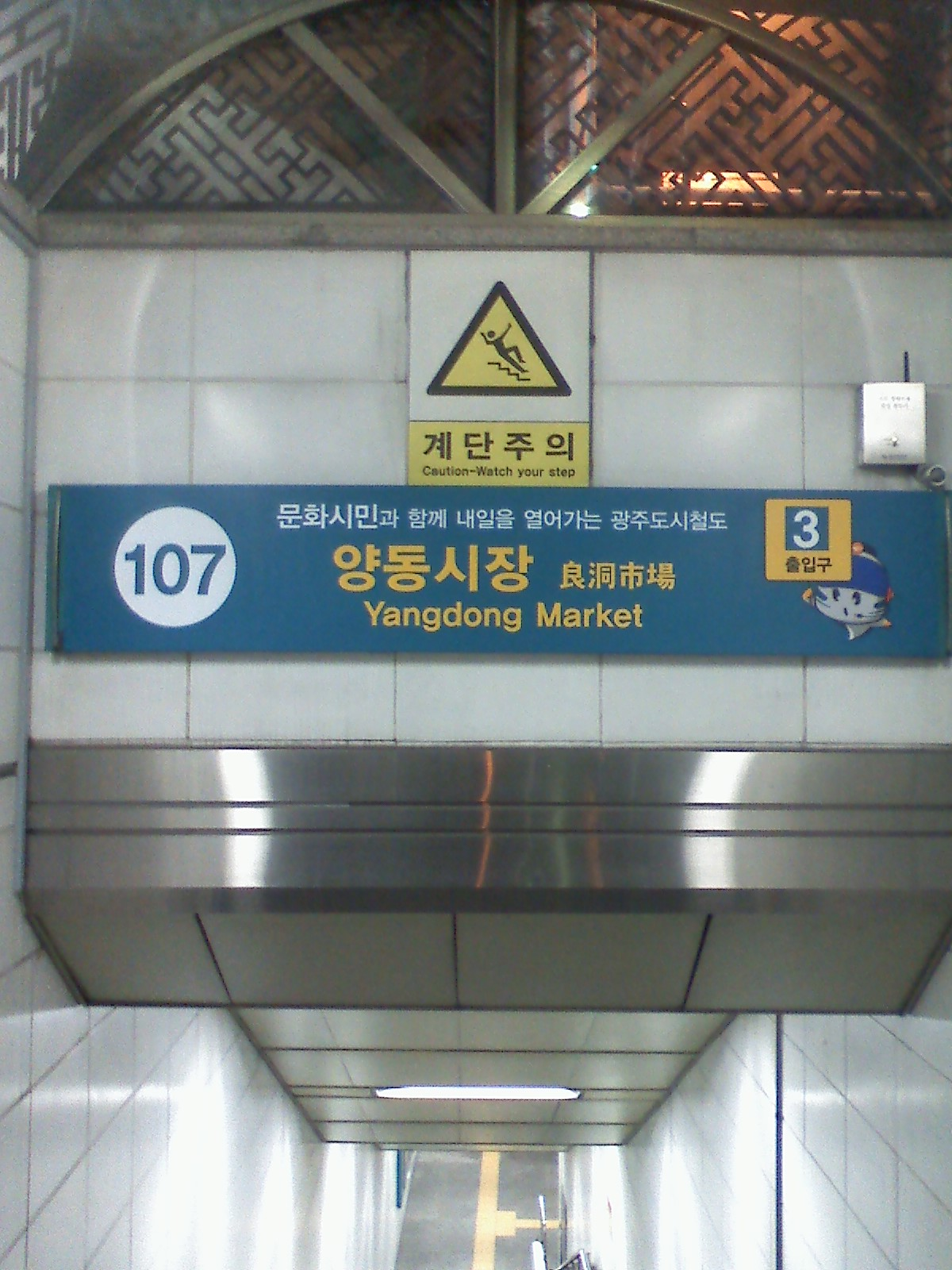 광주 지하철 양동시장역 3번 출구의 역명판 사진입니다.